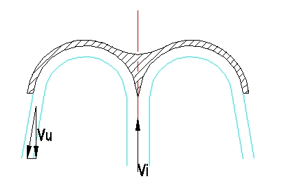 schema di sezione di pala pelton, con getto incidente